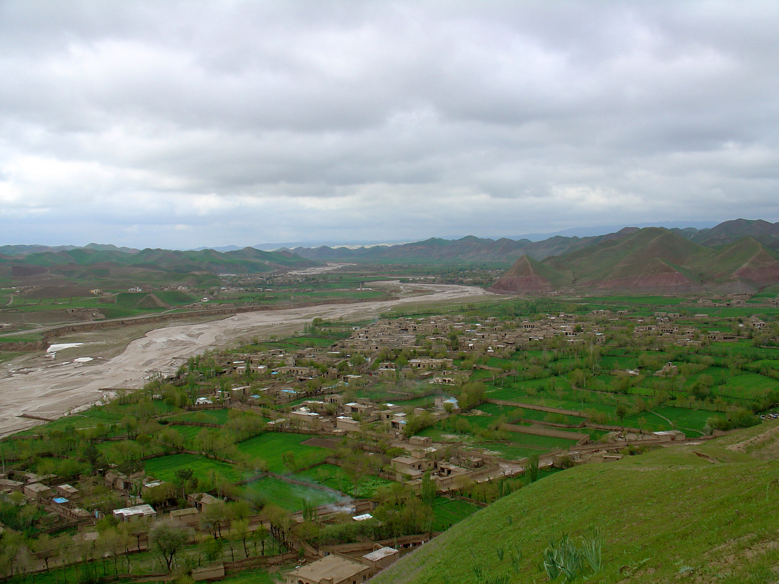 Qala-I-Naw